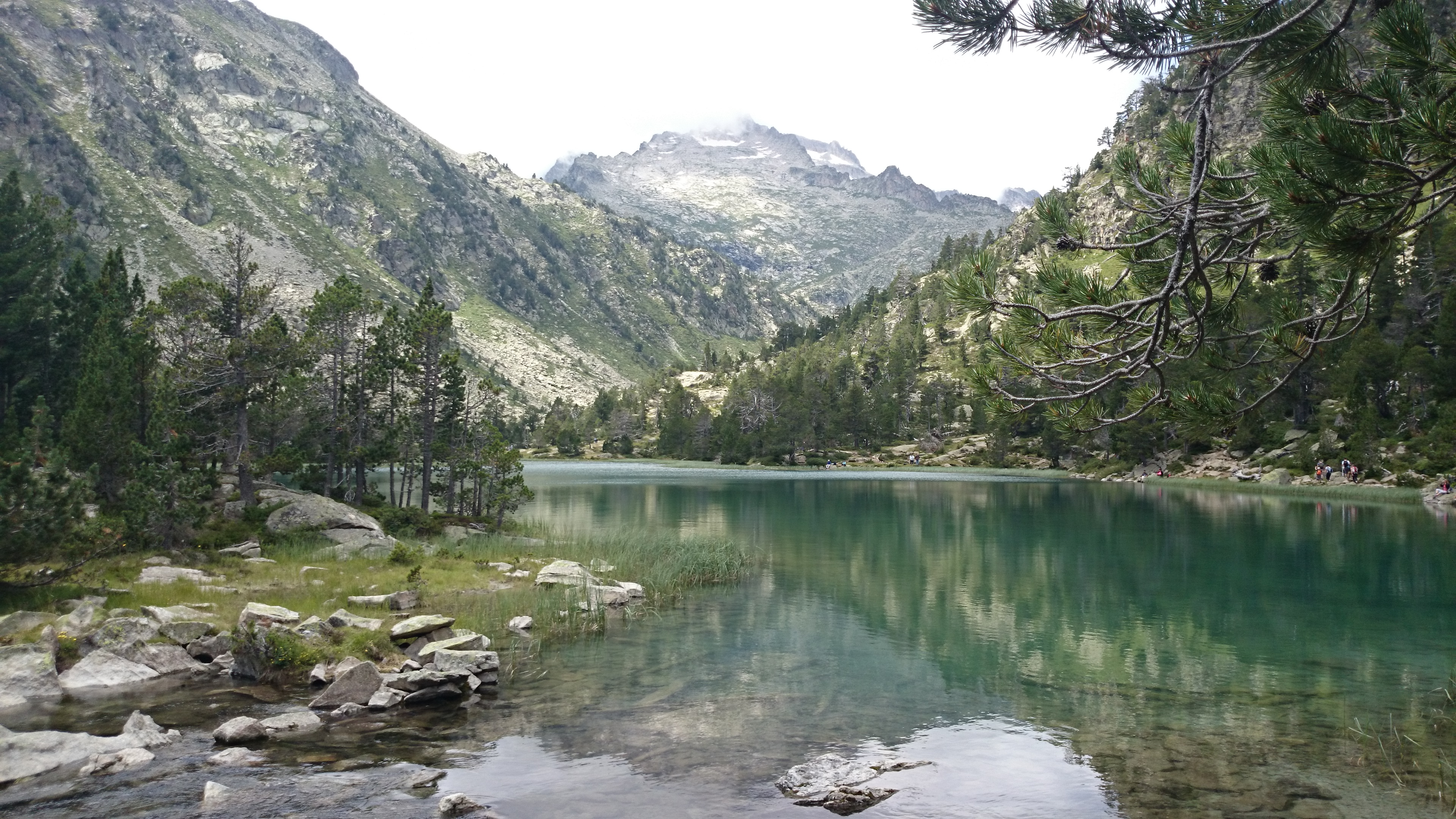 Réserve du Néouvielle les Laquettes